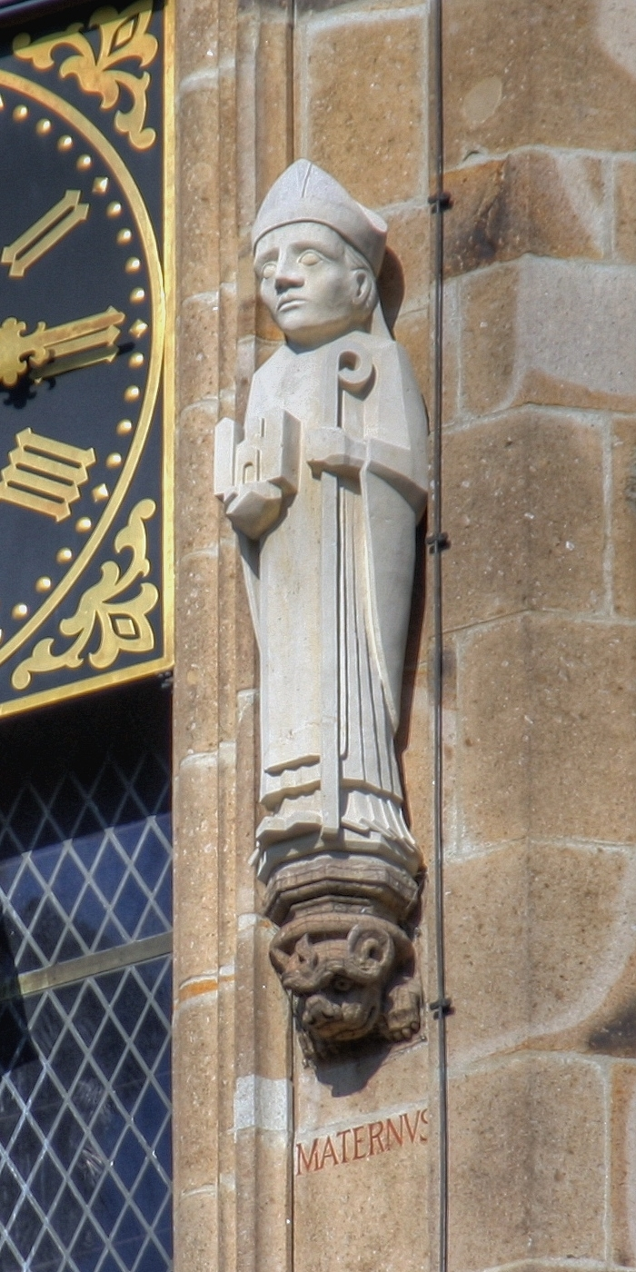 Status des Maternus